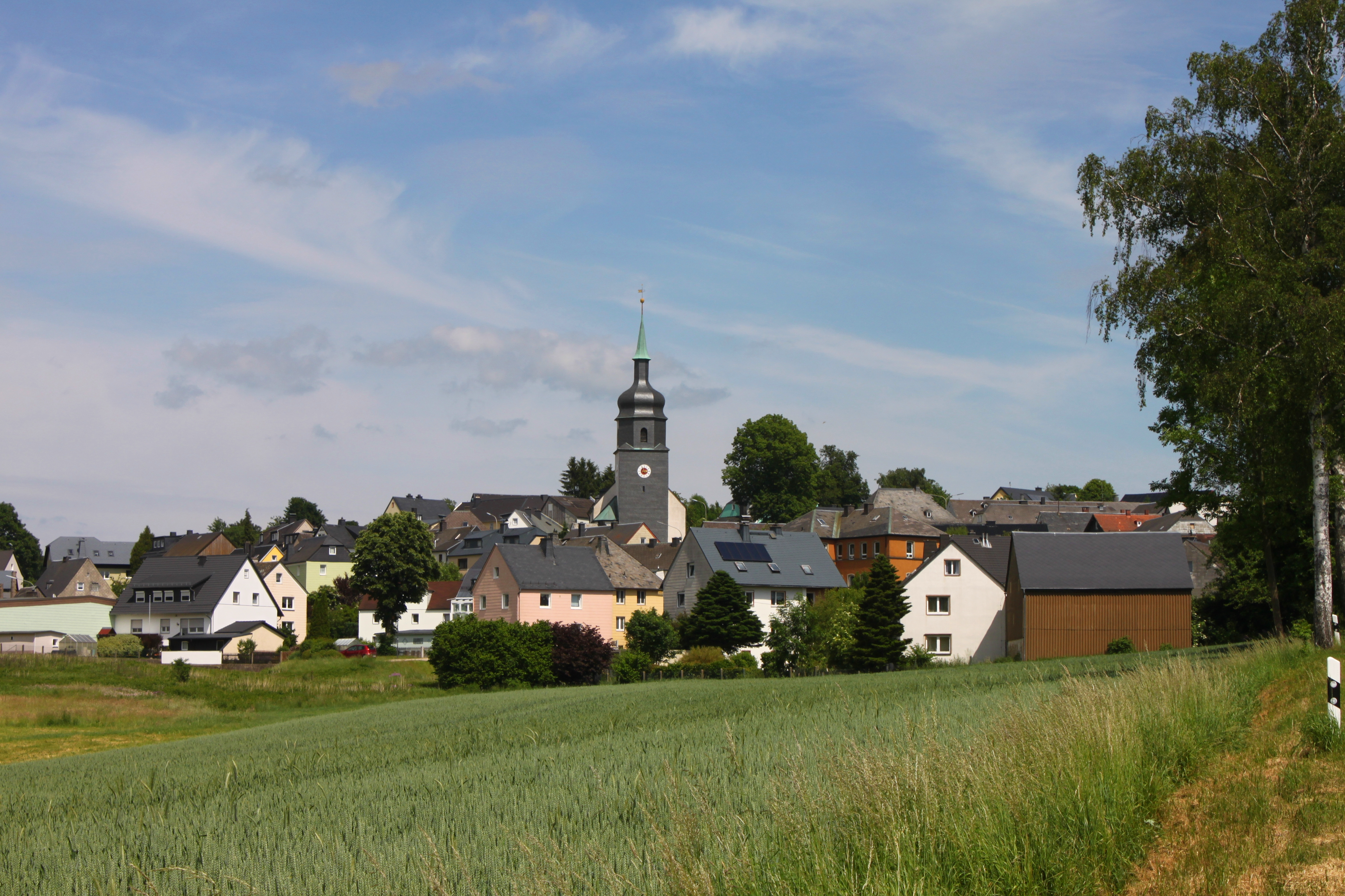 Blick von Westen, von der Straße Richtung Neudorf aus, auf Leupoldsgrün.